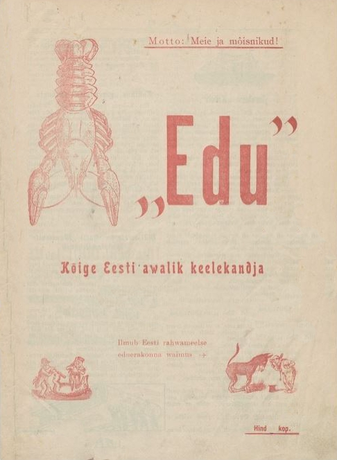 Edu 1906 ajakirja esikaas